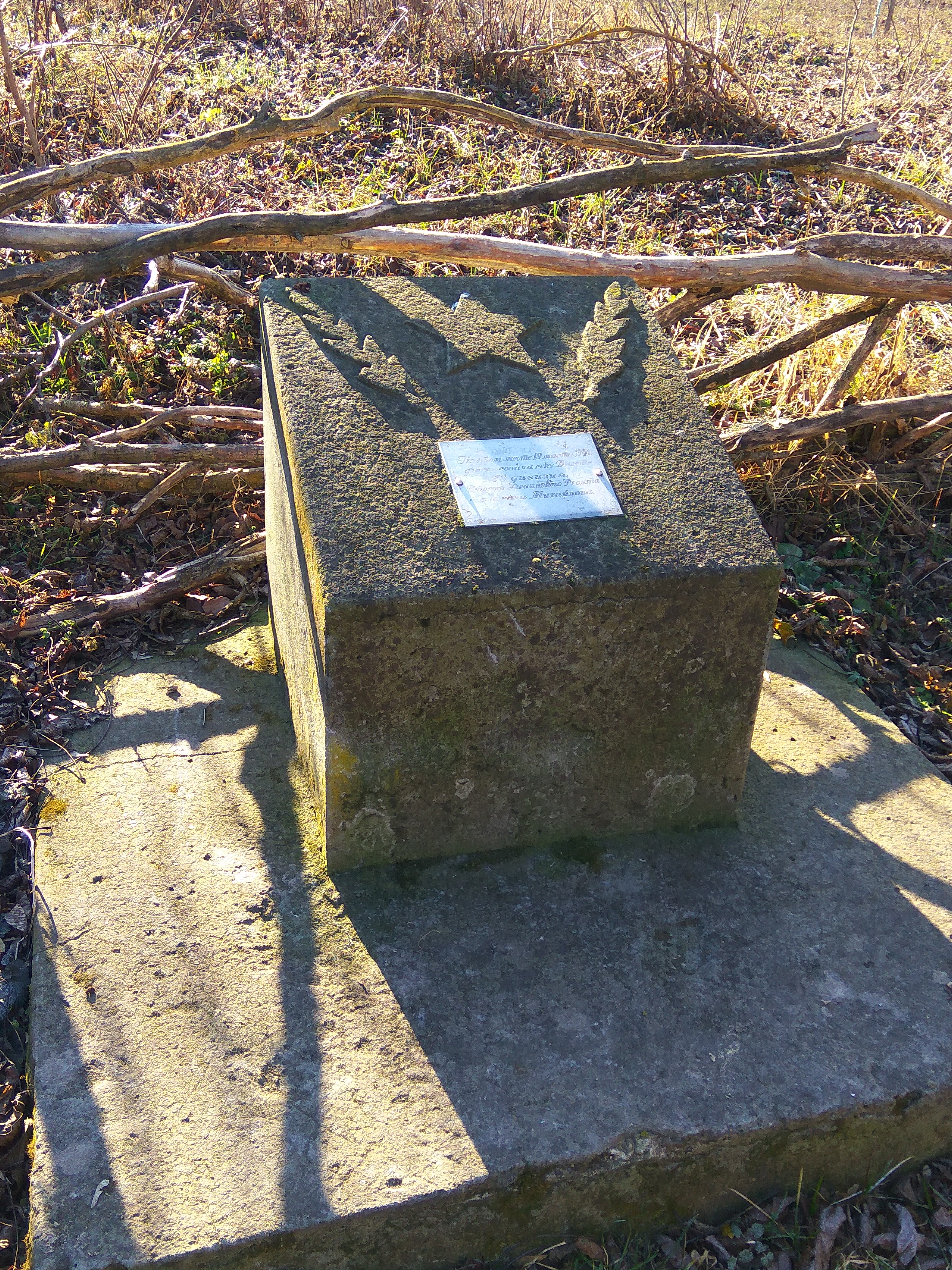 Пам'ятний знак на місці початку форсування Дністра у Садківцях